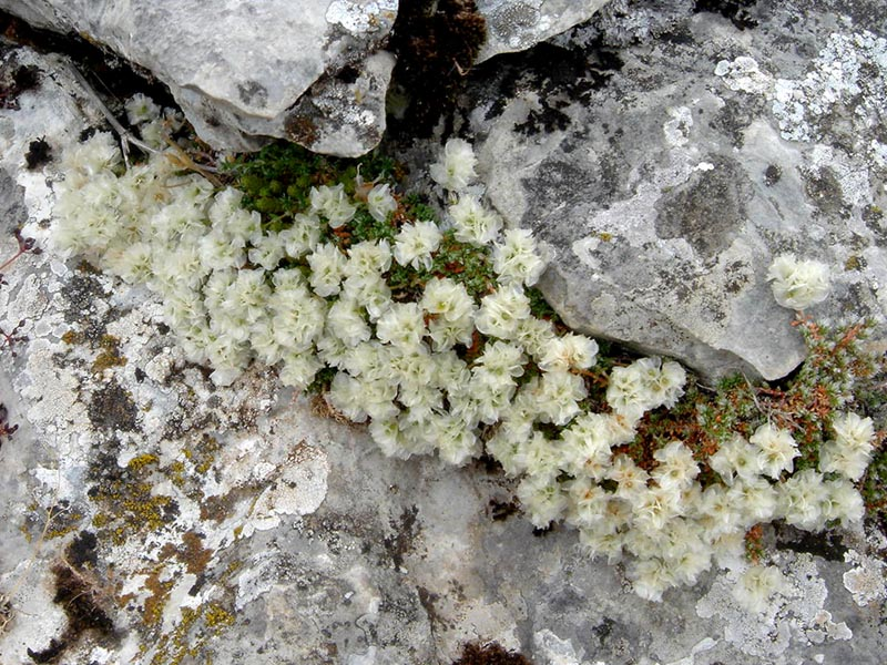 Paronychia kapela subsp. serpyllifolia